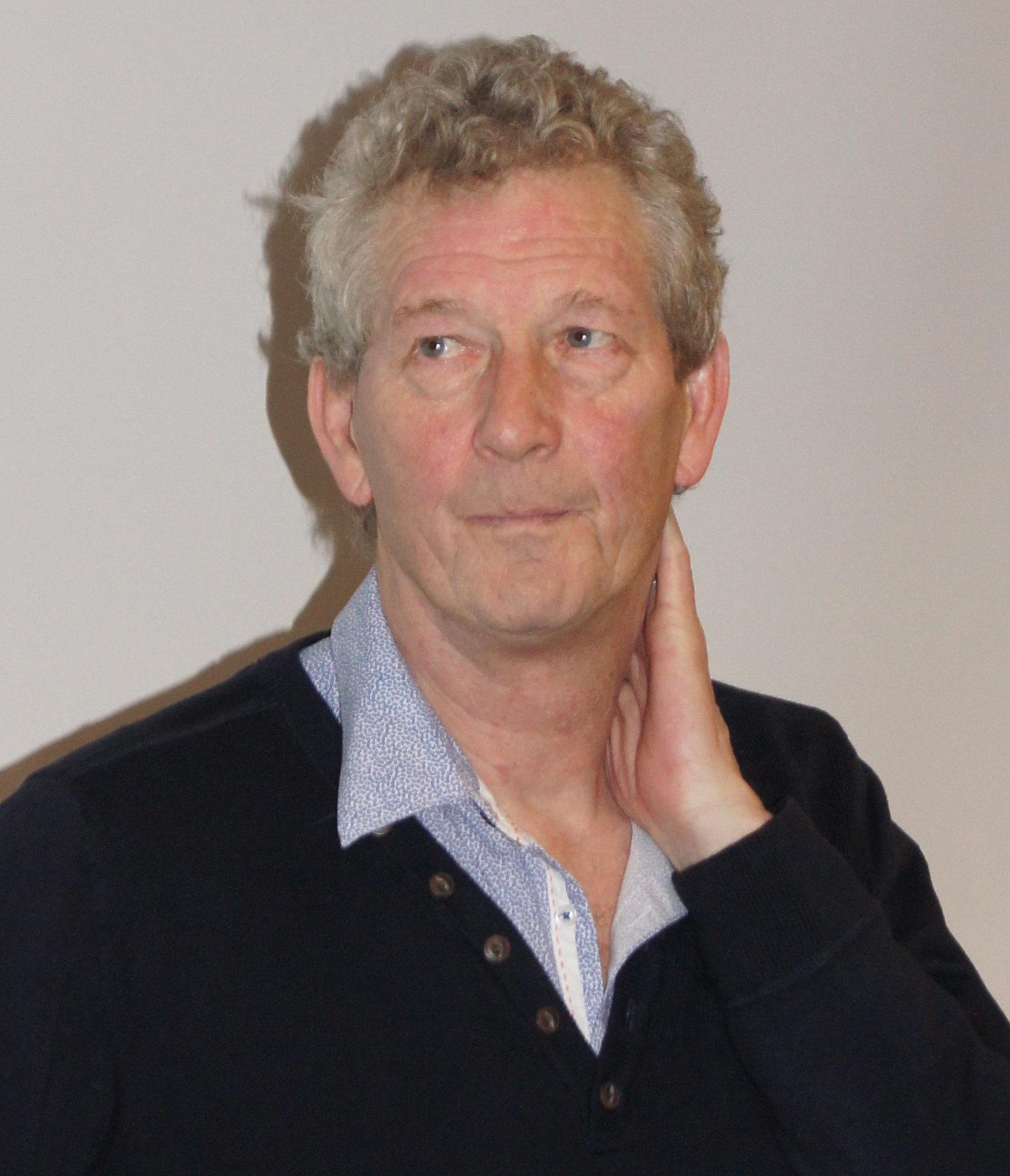 Dirk Bracke, Alken, 24/01/2016